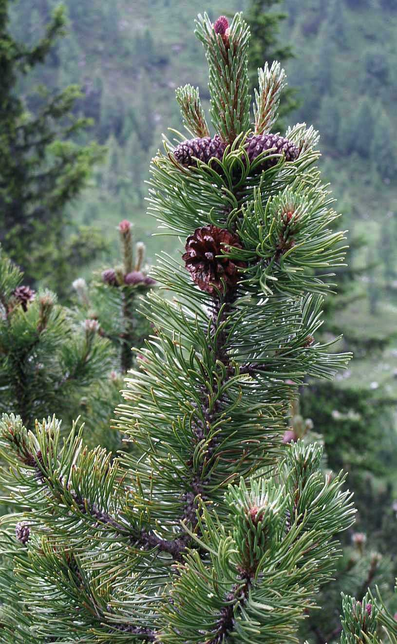 Latschenkiefer (Pinus mugo) Aufgenommen von Benutzer:Tigerente 19.07.2004 Fundort: Nähe Liezener Hütte, Wörschach, Steiermark, Österreich